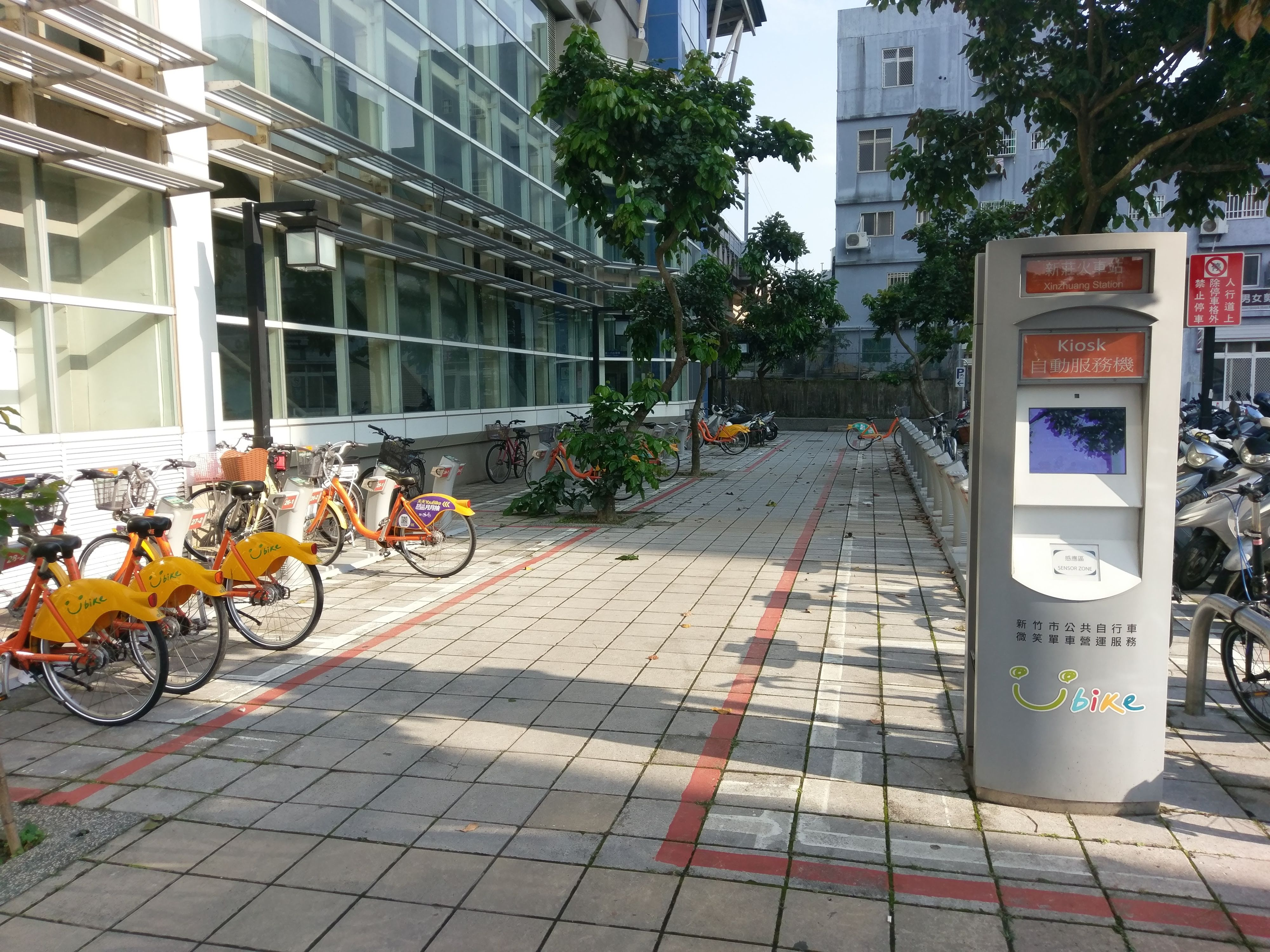 YouBike新莊火車站